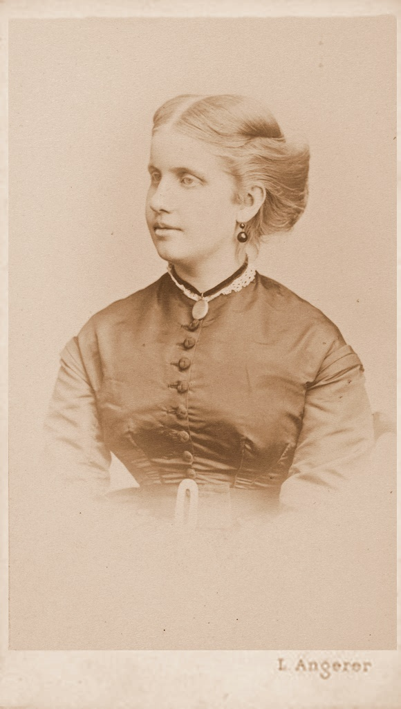 D. Leopoldina de Bragança e Bourbon, segunda filha de D. Pedro II do Brasil e da imperatriz D. Teresa Cristina. (1847-1871)